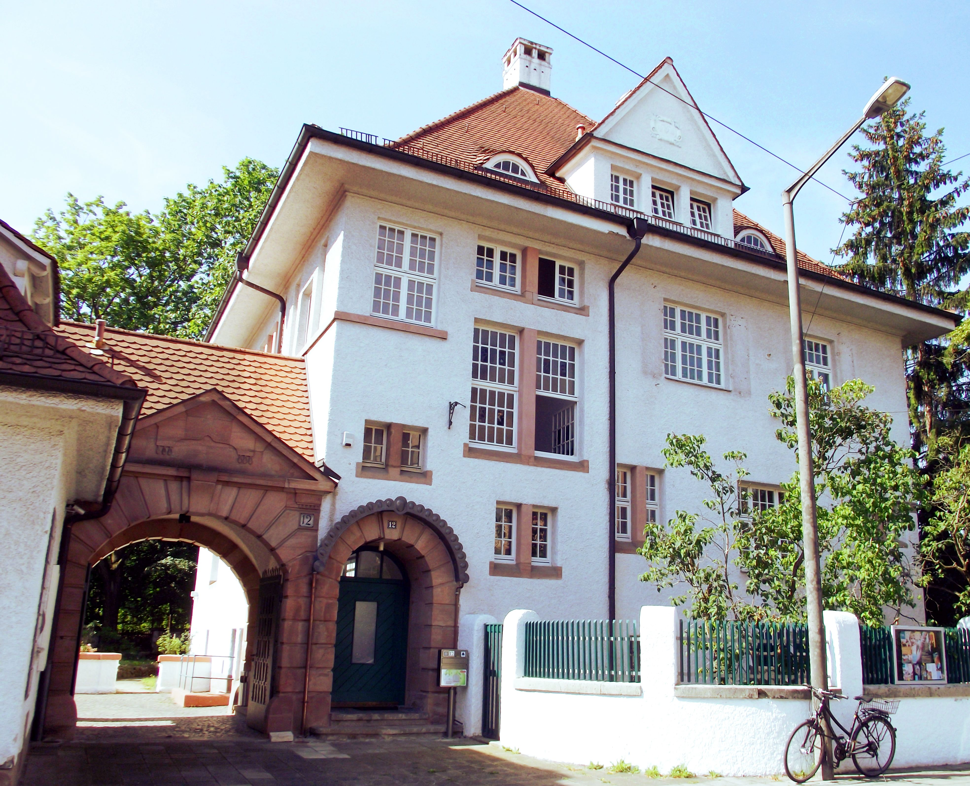 Das Humanistische Zentrum Nürnberg ist Verwaltungssitz des HVD Bayern und dient gleichzeitig als Kulturzentrum und Veranstaltungsort.